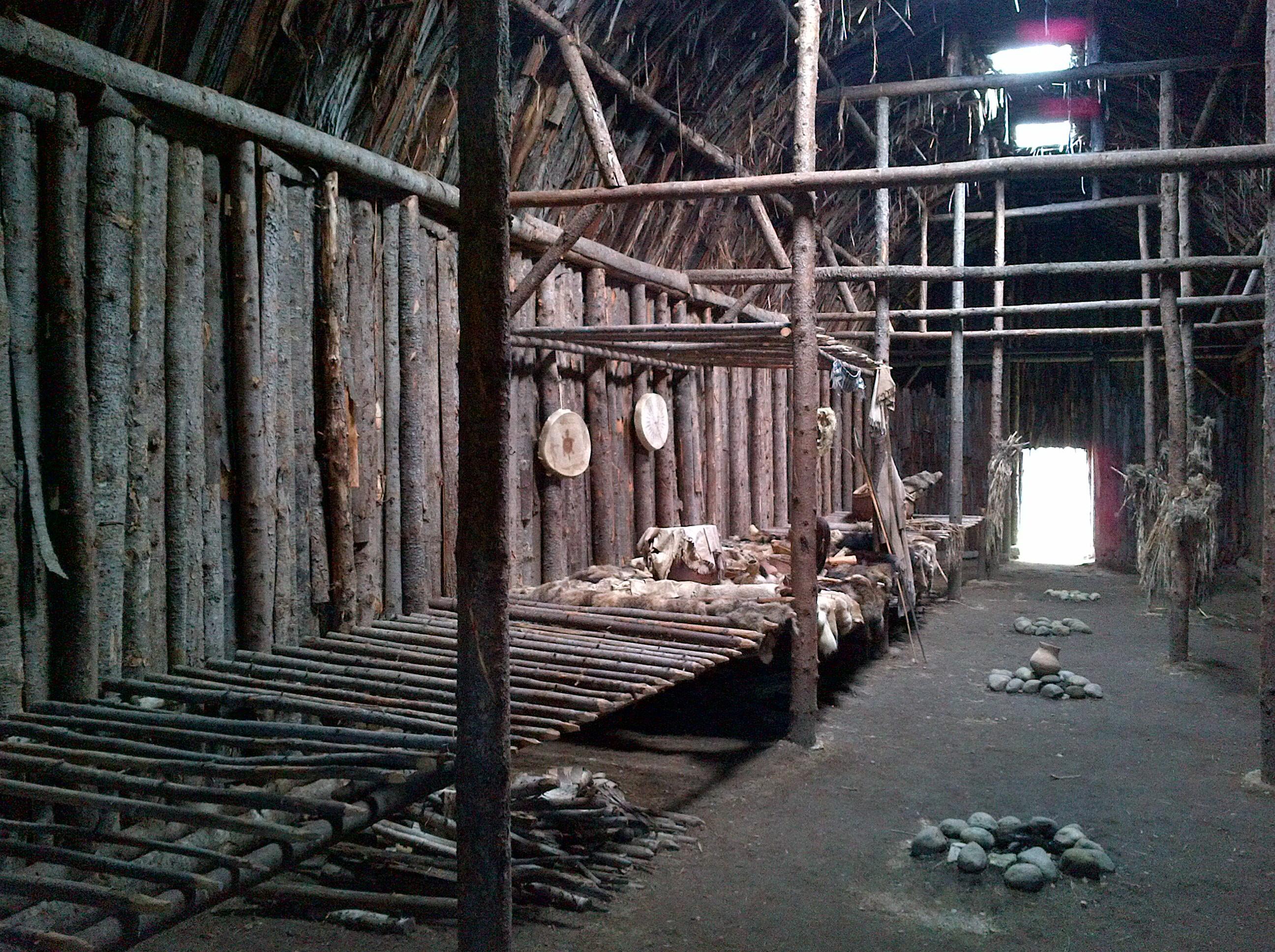 Reconstitution d'une maison longue huronne pour le film "Robe Noire", site de la Nouvelle-France, Saint-Félix-d'Otis, Québec, Canada.